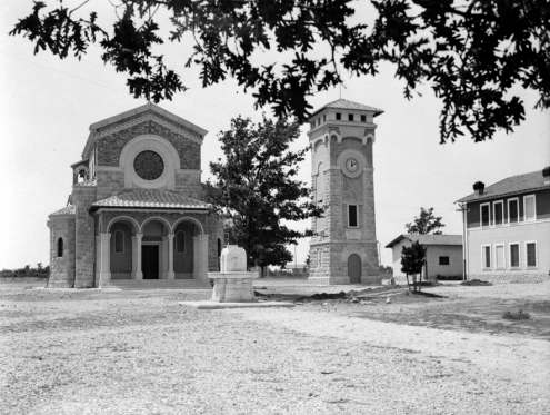 Villaggio Capograssa (oggi Borgo San Michele) - chiesa e torre